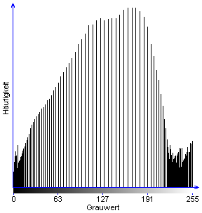 Histogramm des Bildes 113766main 04272005 tinyCrators grey equal.png Quelle: selbst erstellt